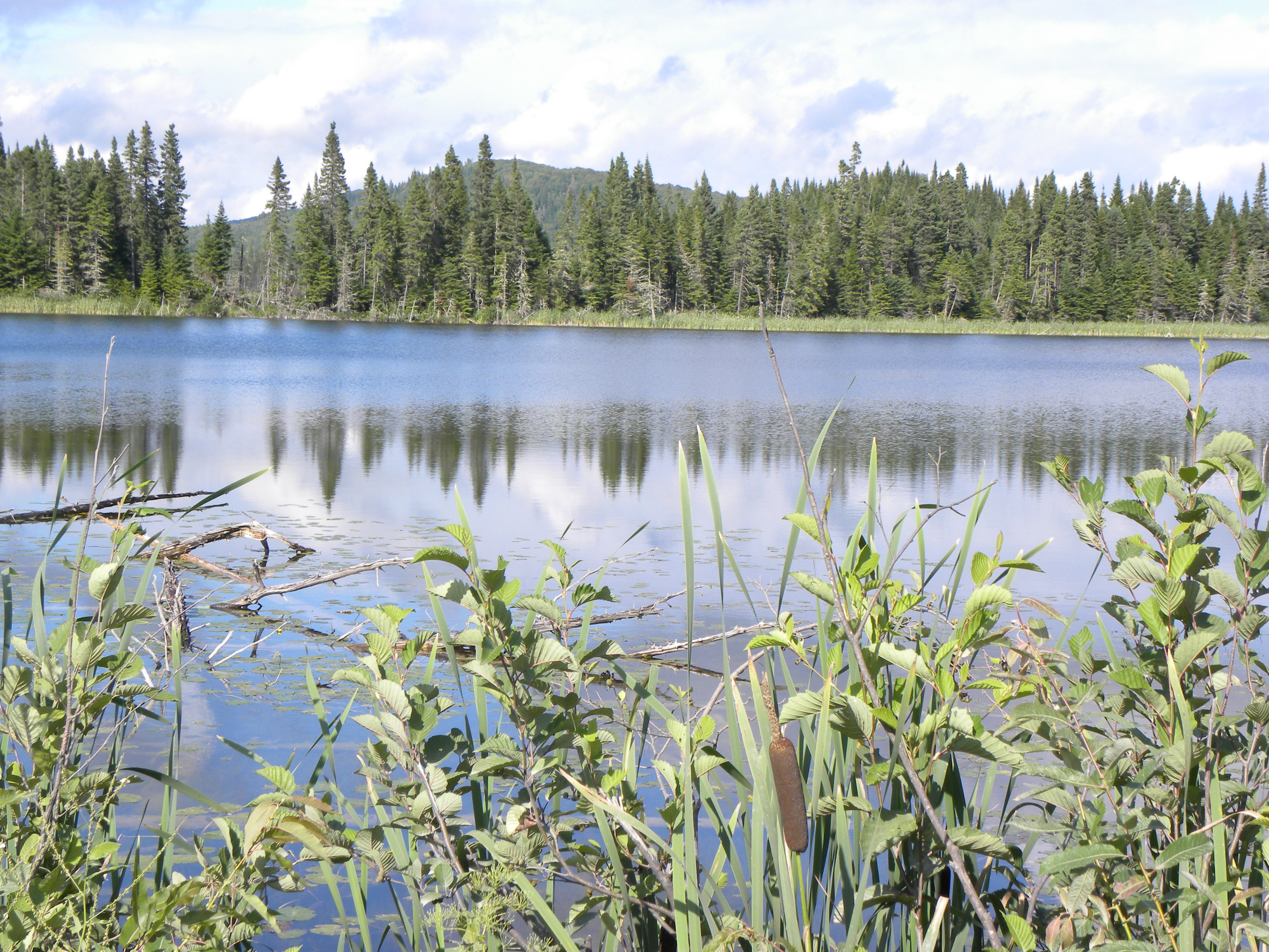 Lac des Cent Pins